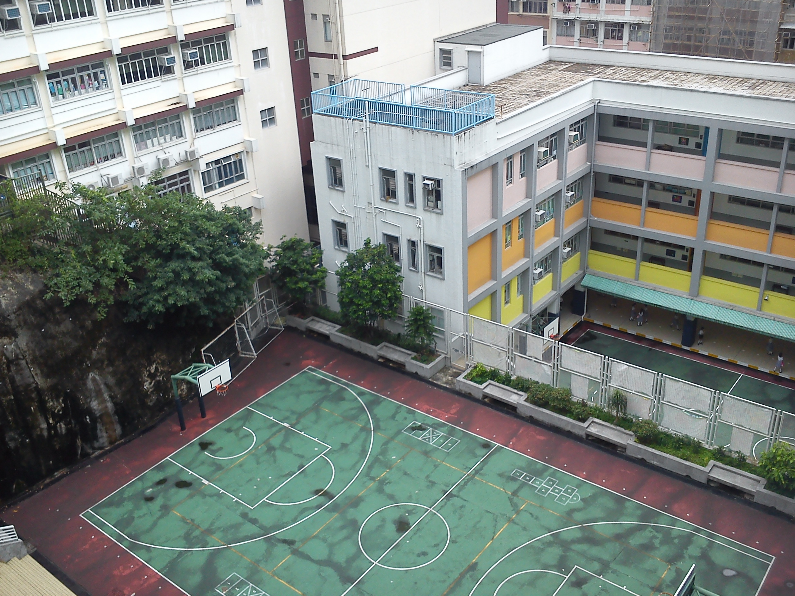 中文（中国大陆）: 香港中國婦女會丘佐榮学校7楼高空拍摄